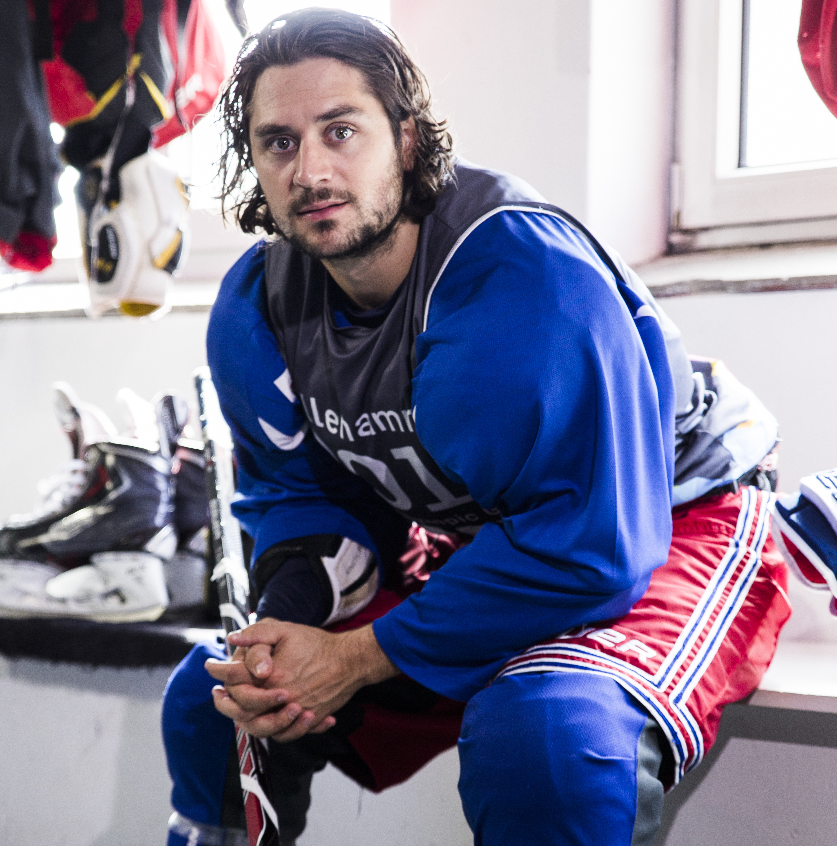 Photo: Trine Merete Olsen